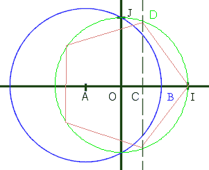 Création d'un pentagone à l'aide d'une règle et d'un compas